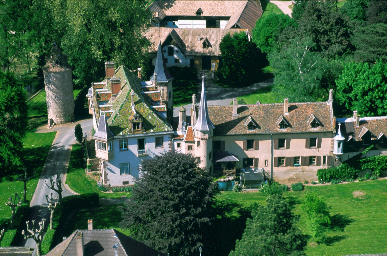 le château de Turckheim, à Dachstein, Bas-Rhin